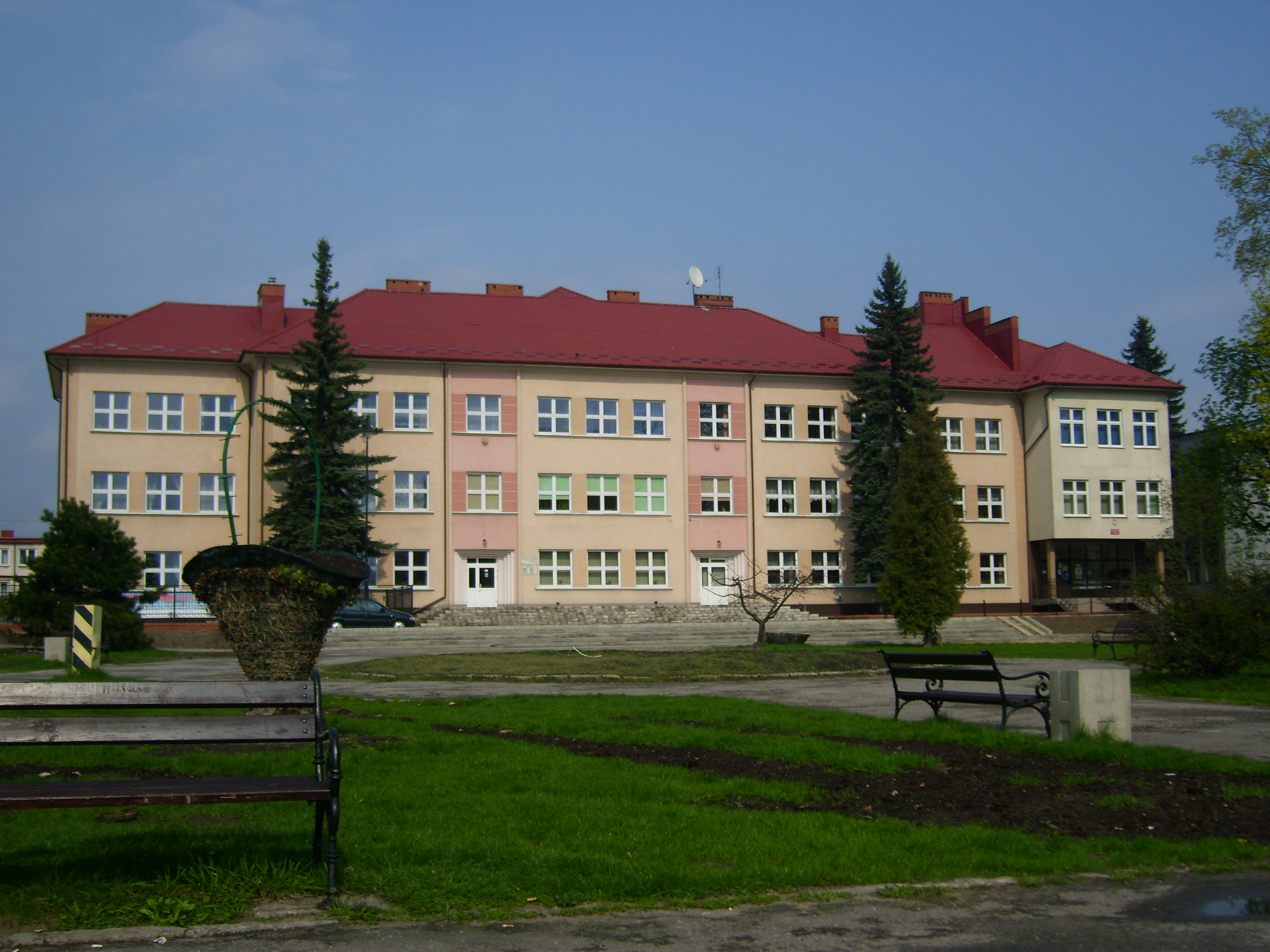 Budynek Liceum Ogólnokształcącego im. Boharterów Porytowego wzgórza 1.